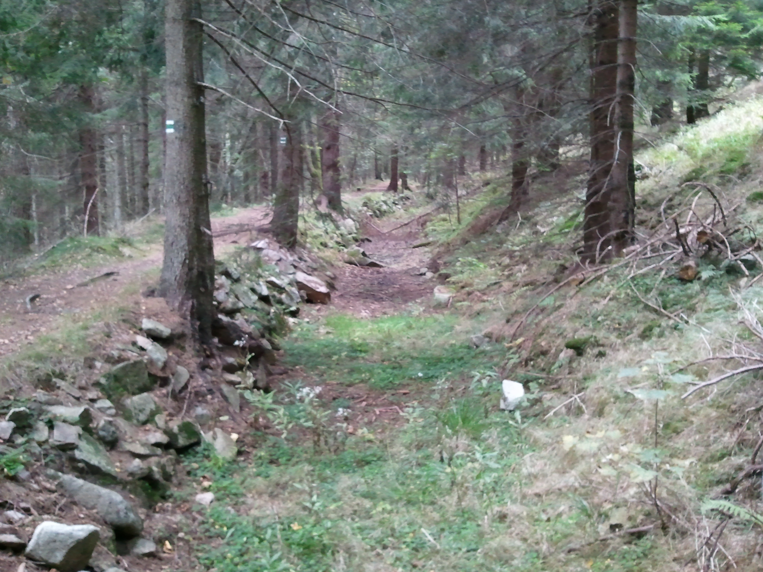 Vodní kanál plavební - Flájský splavný kanál (Český Jiřetín), z Flájí do Clausnitz, Český Jiřetín